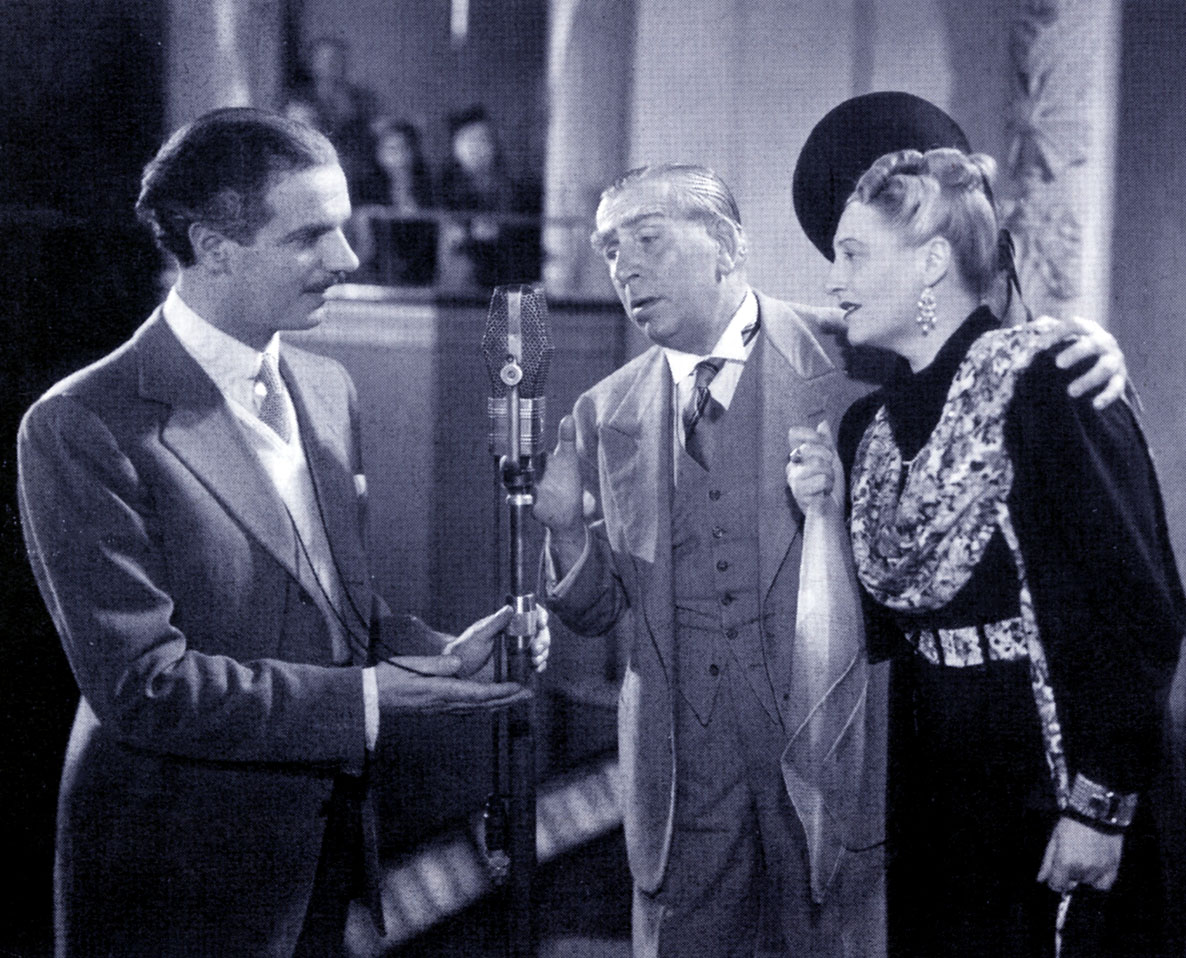 screenshot del film Una famiglia impossibile (1940)